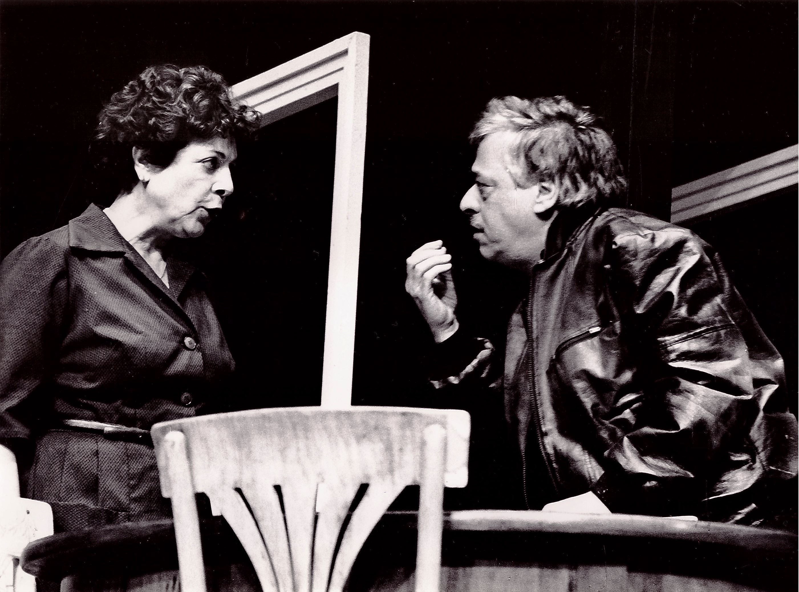 רבקה גור בתפקיד ביאטריס בהצגה "מראה מעל הגשר" לצידו של יוסי בנאי